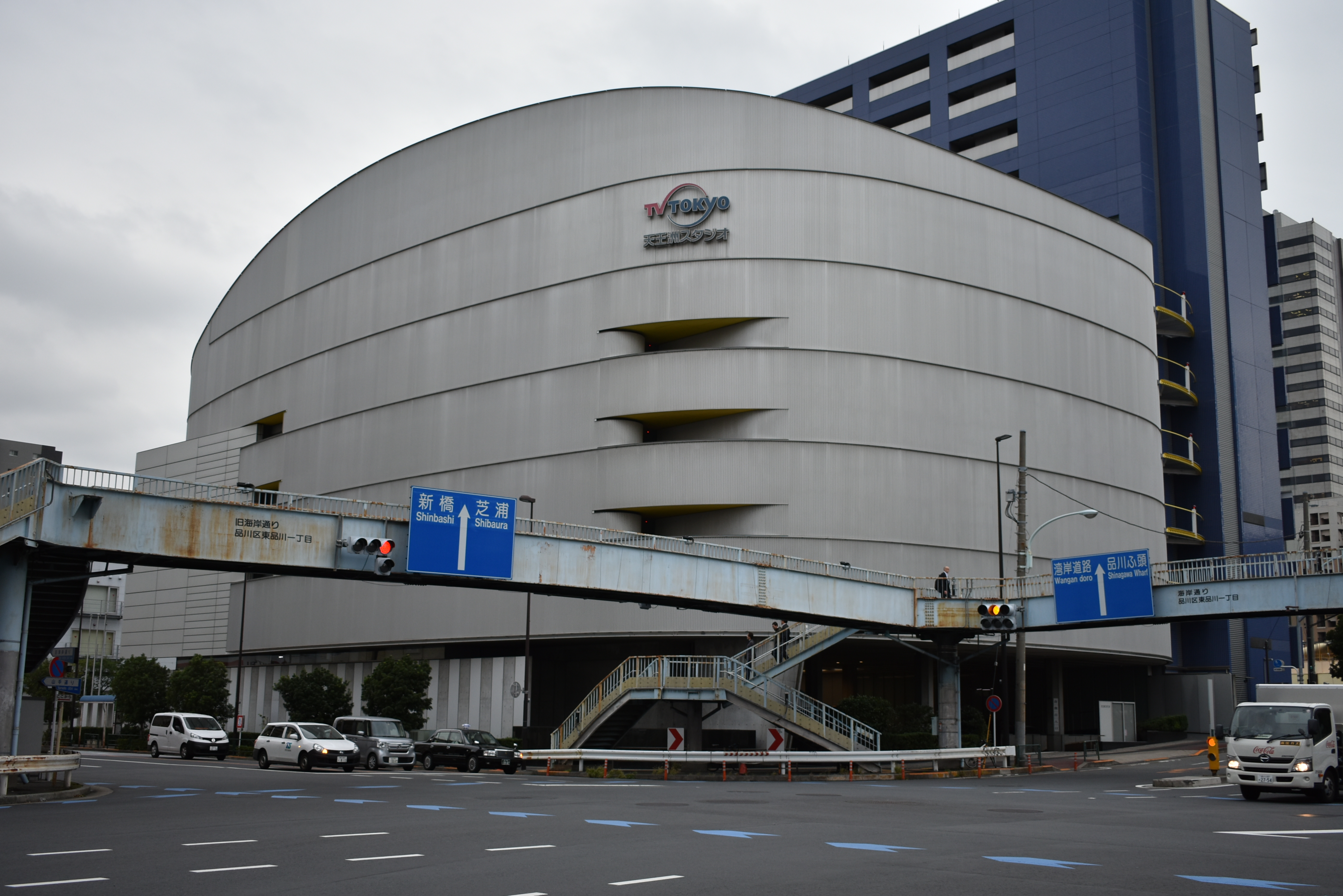 テレビ東京天王洲スタジオ